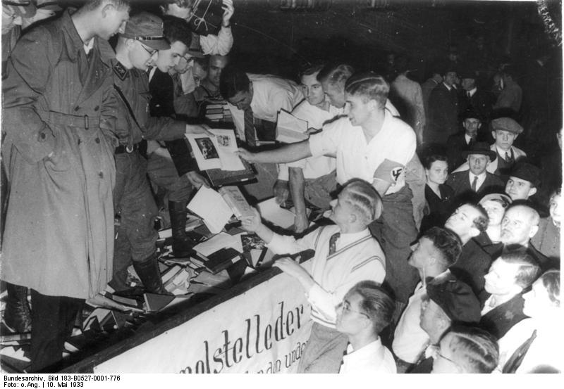 ADN-ZB/Archiv Bücherverbrennung durch die Hitlerfaschisten am 10.5.1933 in Hochschulstädten Deutschlands. Organisierte Vernichtung von Werken der Klassiker des Marxismus-Leninismus, der Führer der deutschen Arbeiterbewegung und Werke der deutschen National- und der Weltliteratur. Die beschlagnahmtem Bücher werden auf einem Wagen gesammelt und zur Verbrennung auf den Opernplatz in Berlin gefahren.